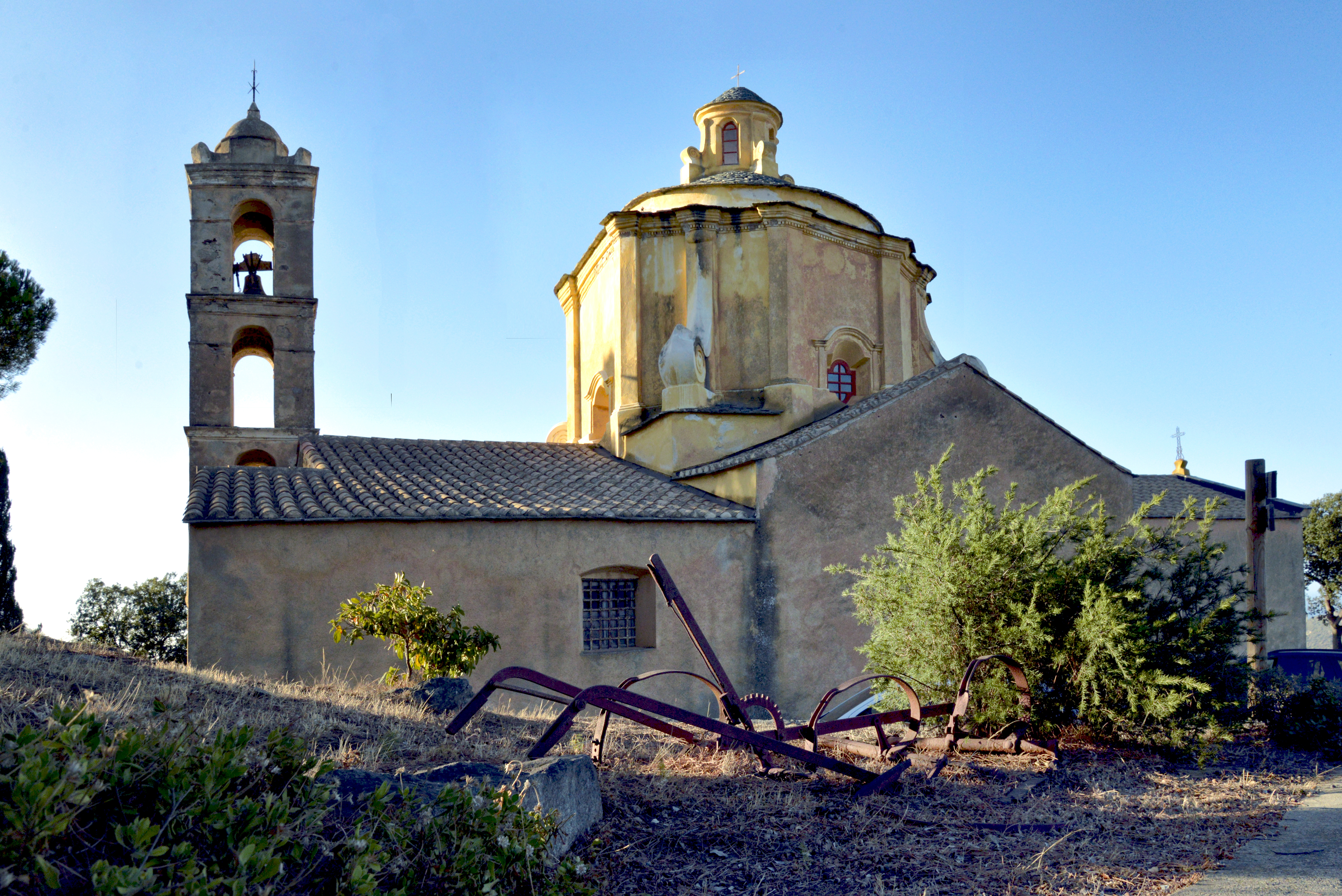 Monticello, Balagne (Haute-Corse) - Église Saint-François-Xavier, classée